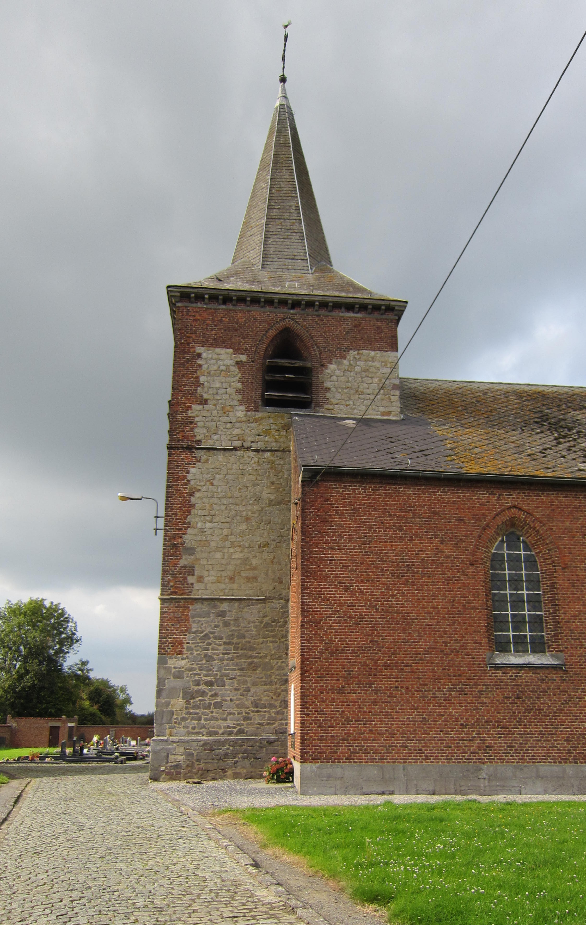 L'église d'Onnezies.